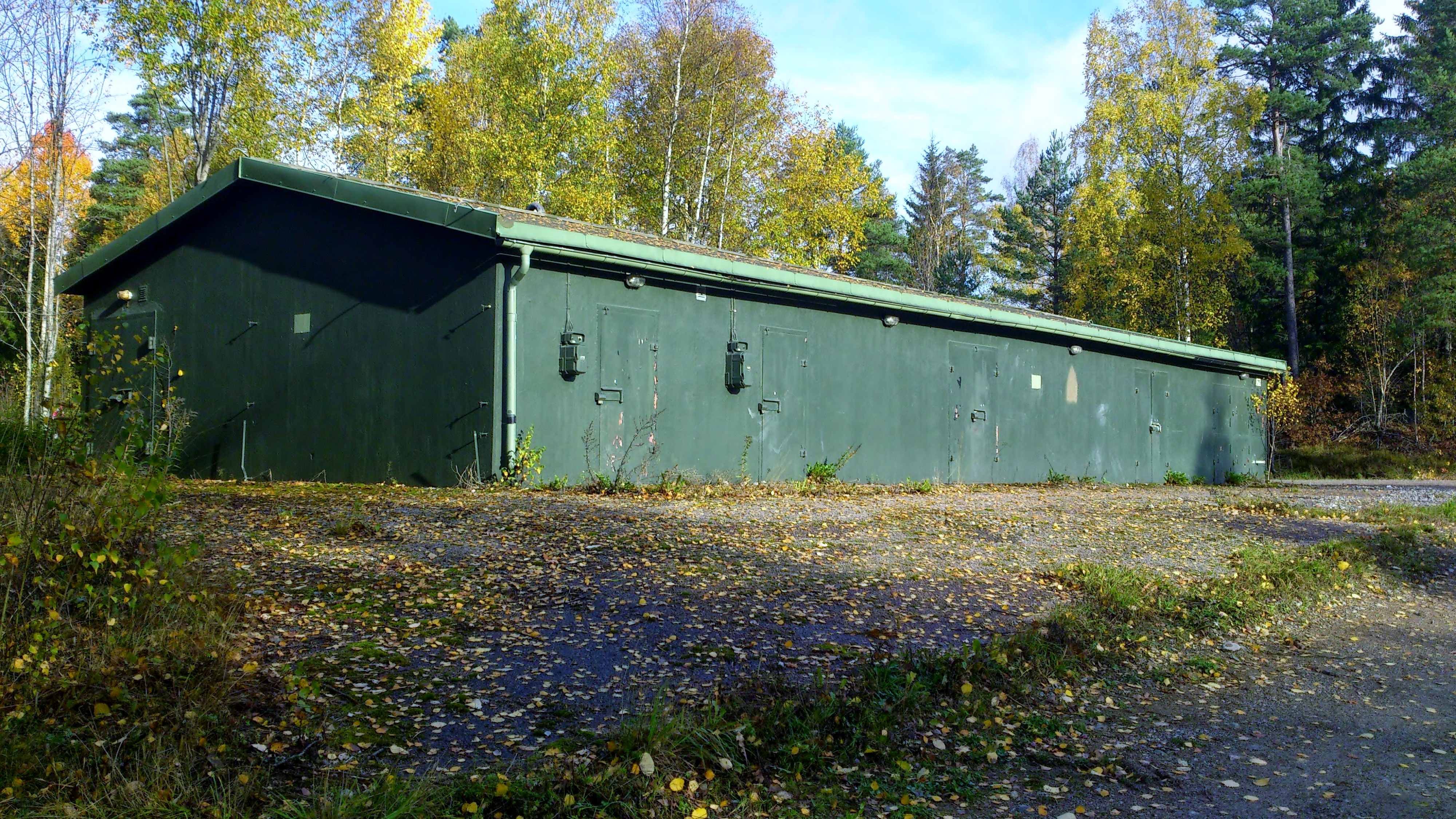 Vapenkassun någonstans i Sverige.